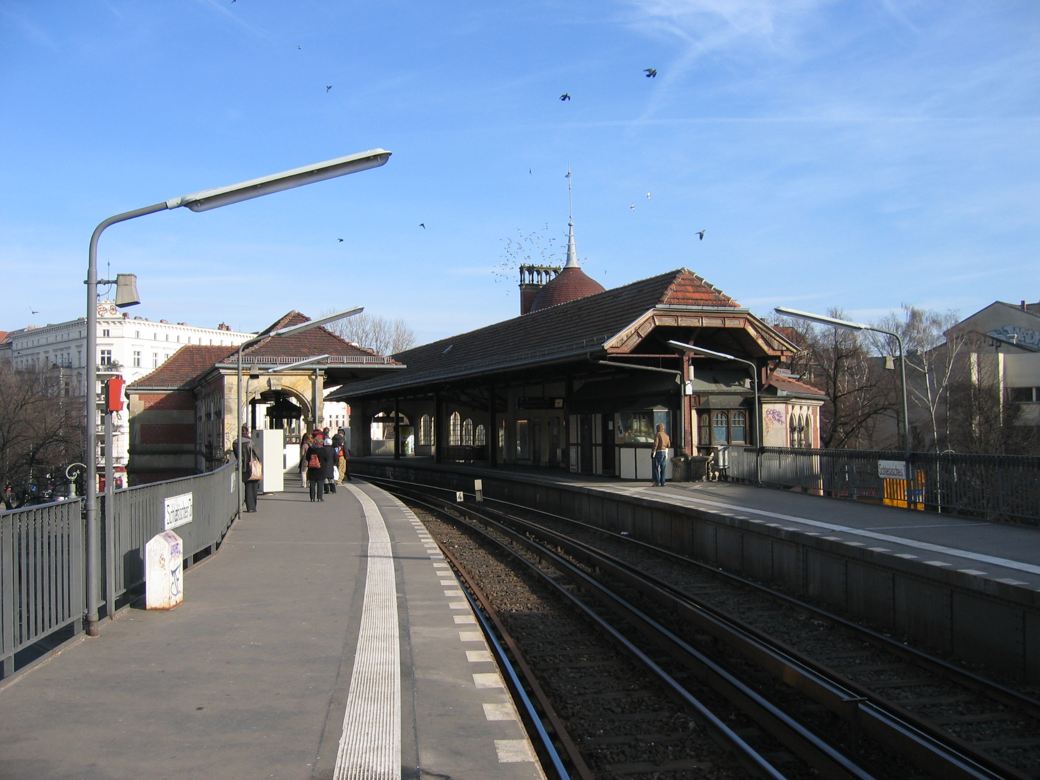 U-Bahnhof Schlesisches Tor in Berlin, Bahnsteige